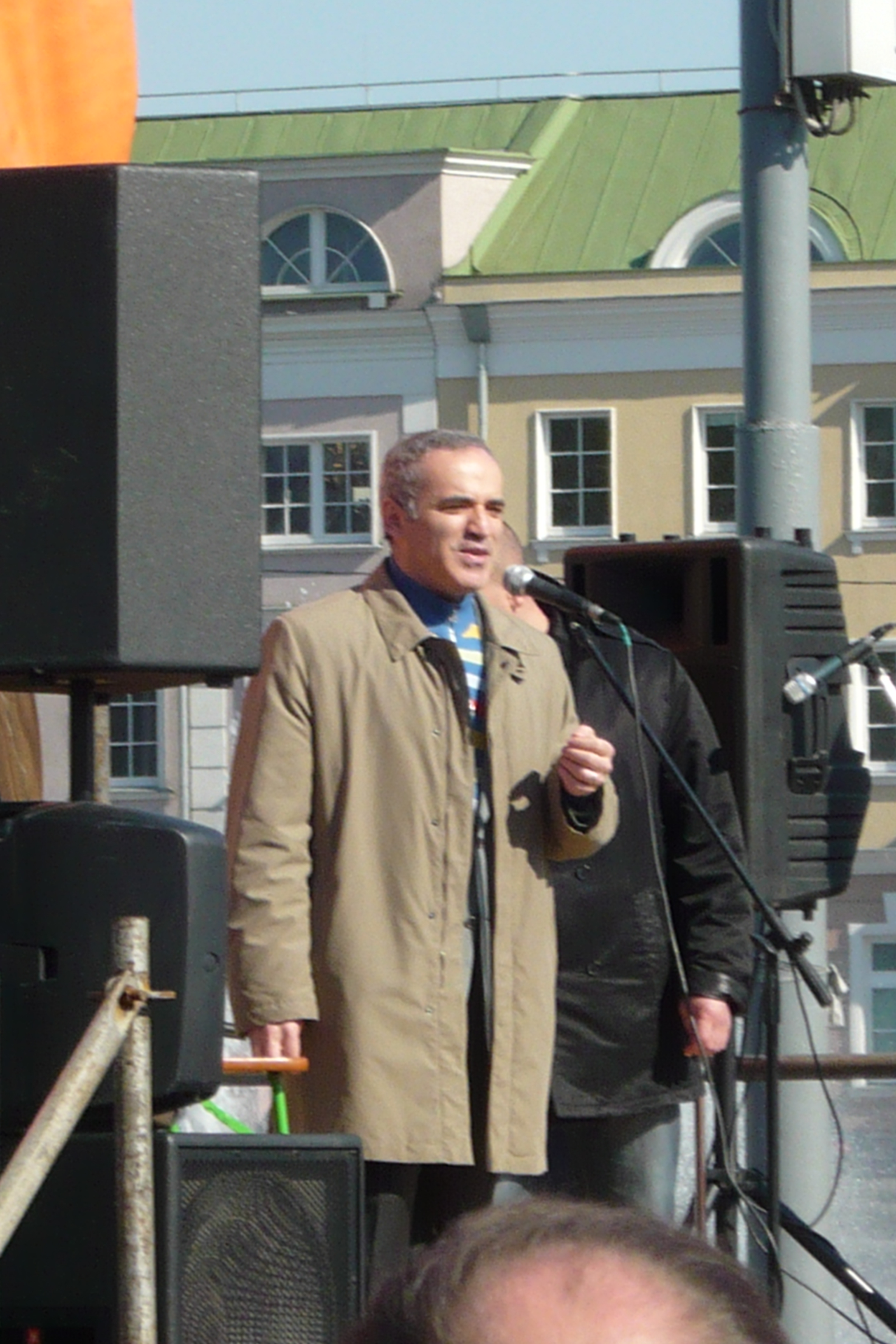 Первый первомайский митинг движения Солидарность